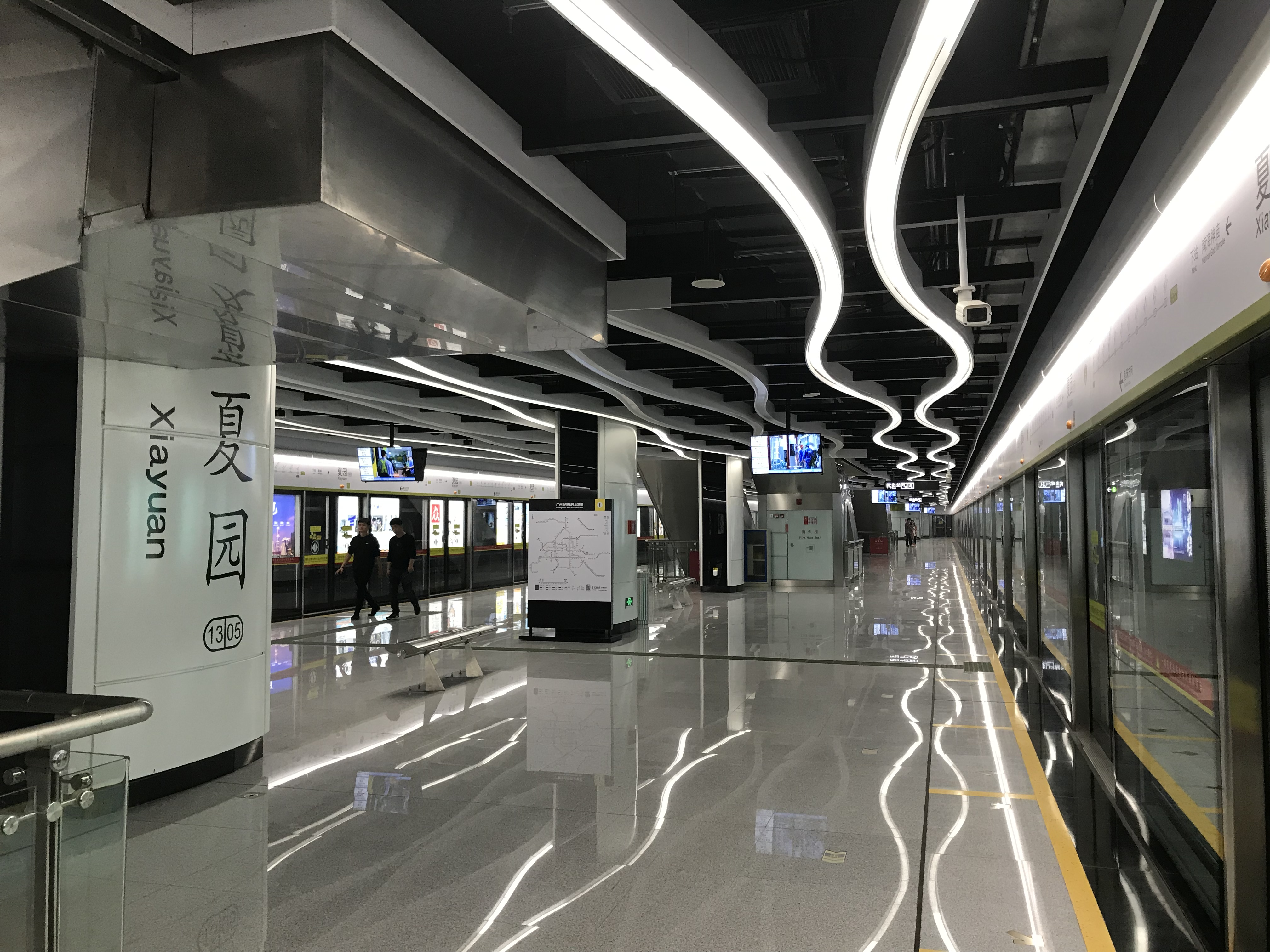 广州地铁夏园站